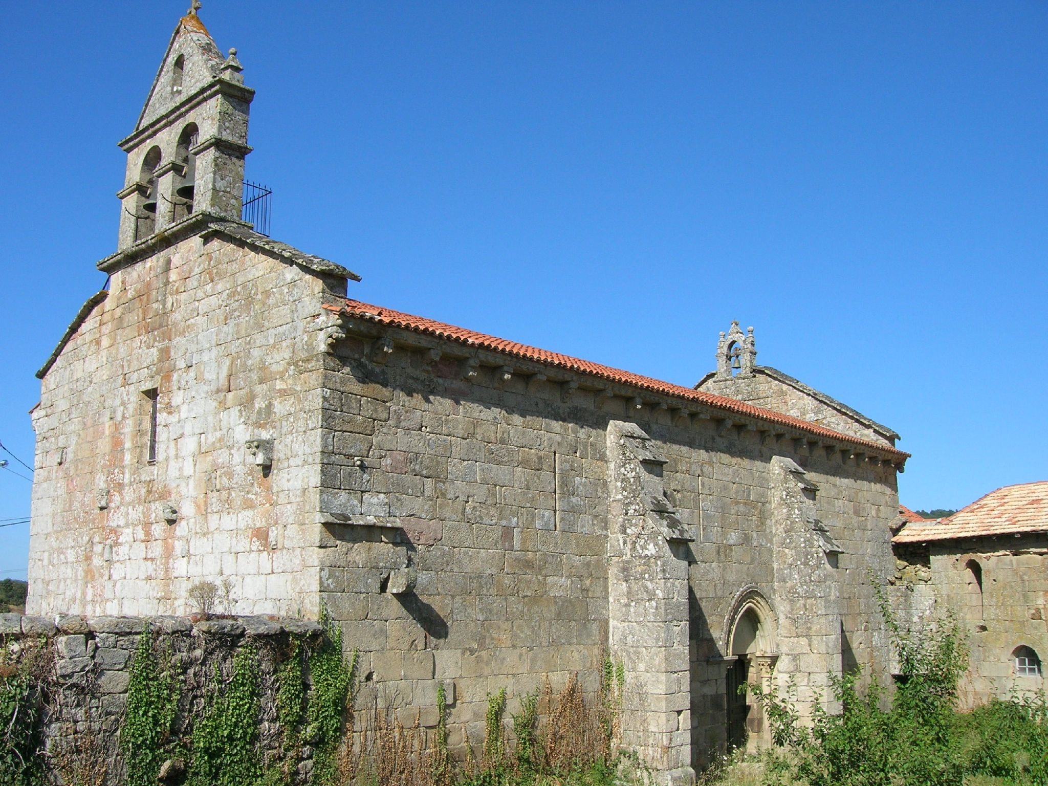 Iglesia románica de transición que perteneció a un antiguo monasterio fundado por el anacoreta San Munio y cuyos restos se encuentran en un sepulcro en el altar de la iglesia.